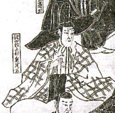 上杉重定の肖像。